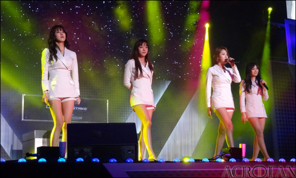 카스 온라인 월드 챔피언십 2014 결선 토너먼트